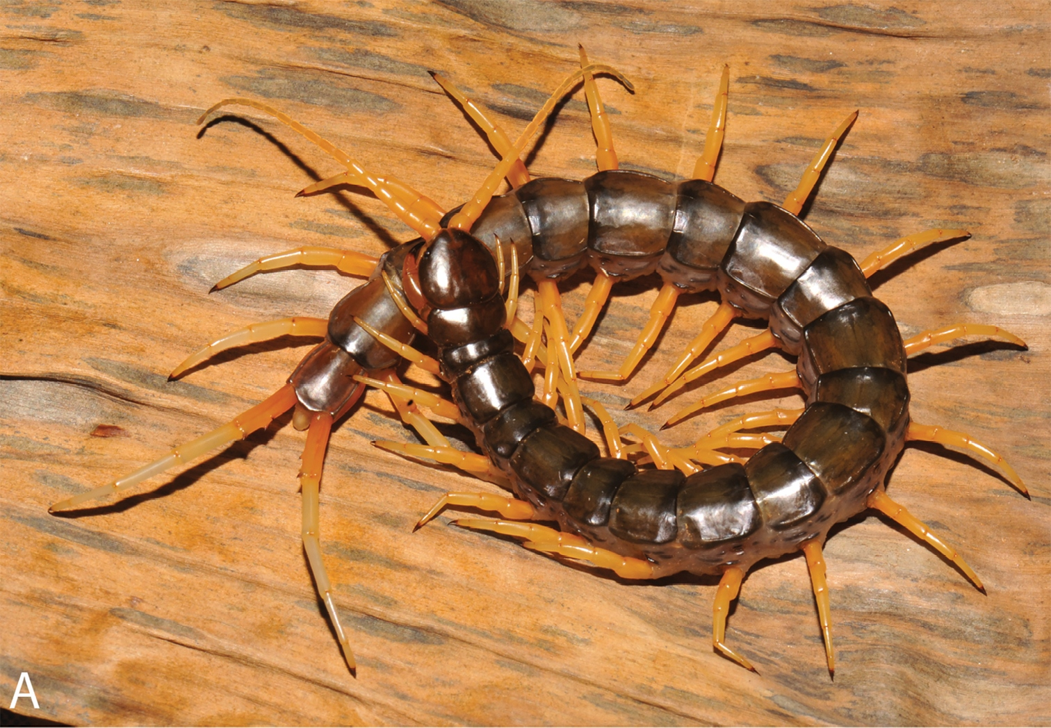 Фотография живой сколопендры Scolopendra cataracta